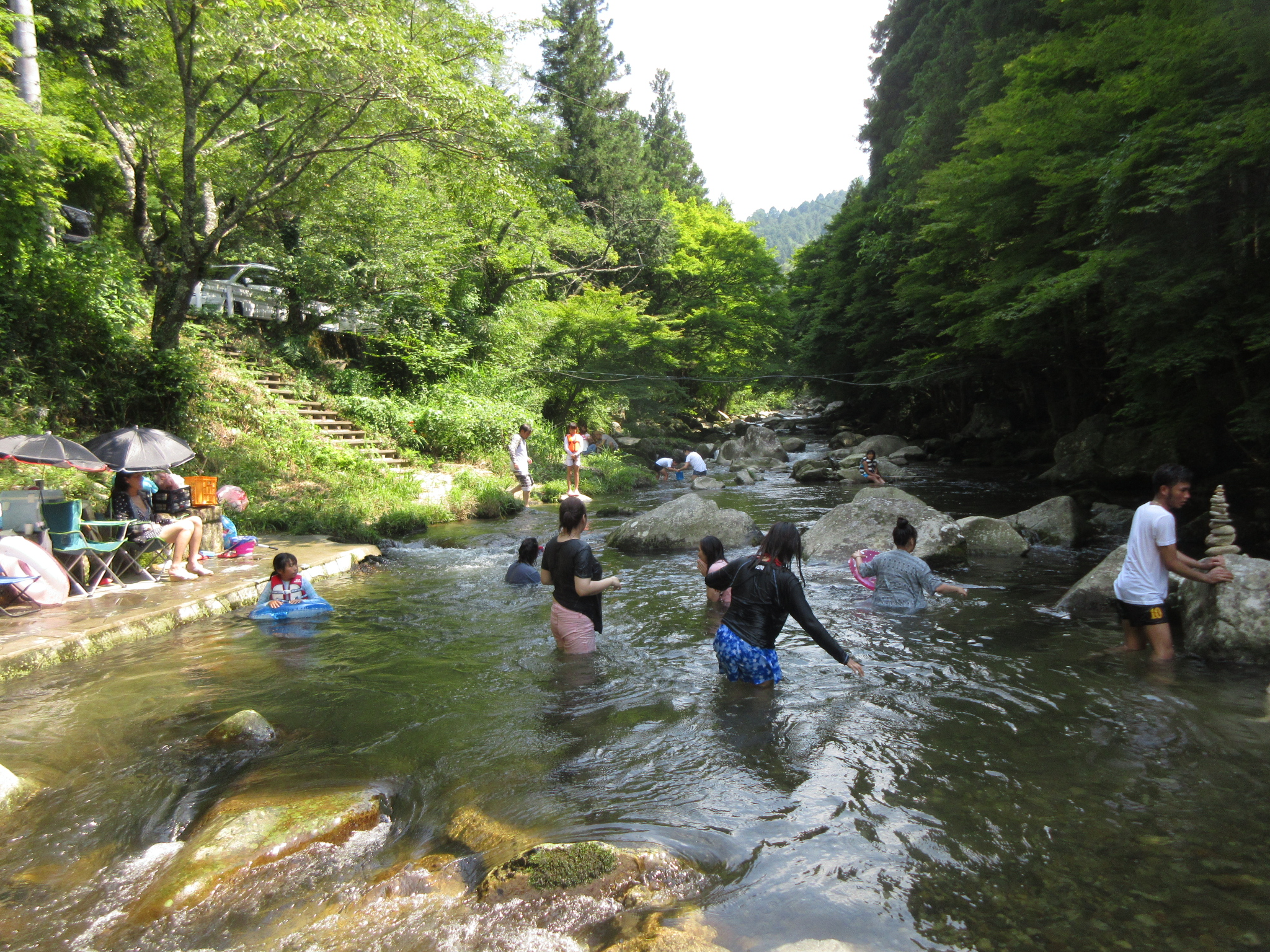 かおれ渓谷（岡崎市桜形町）